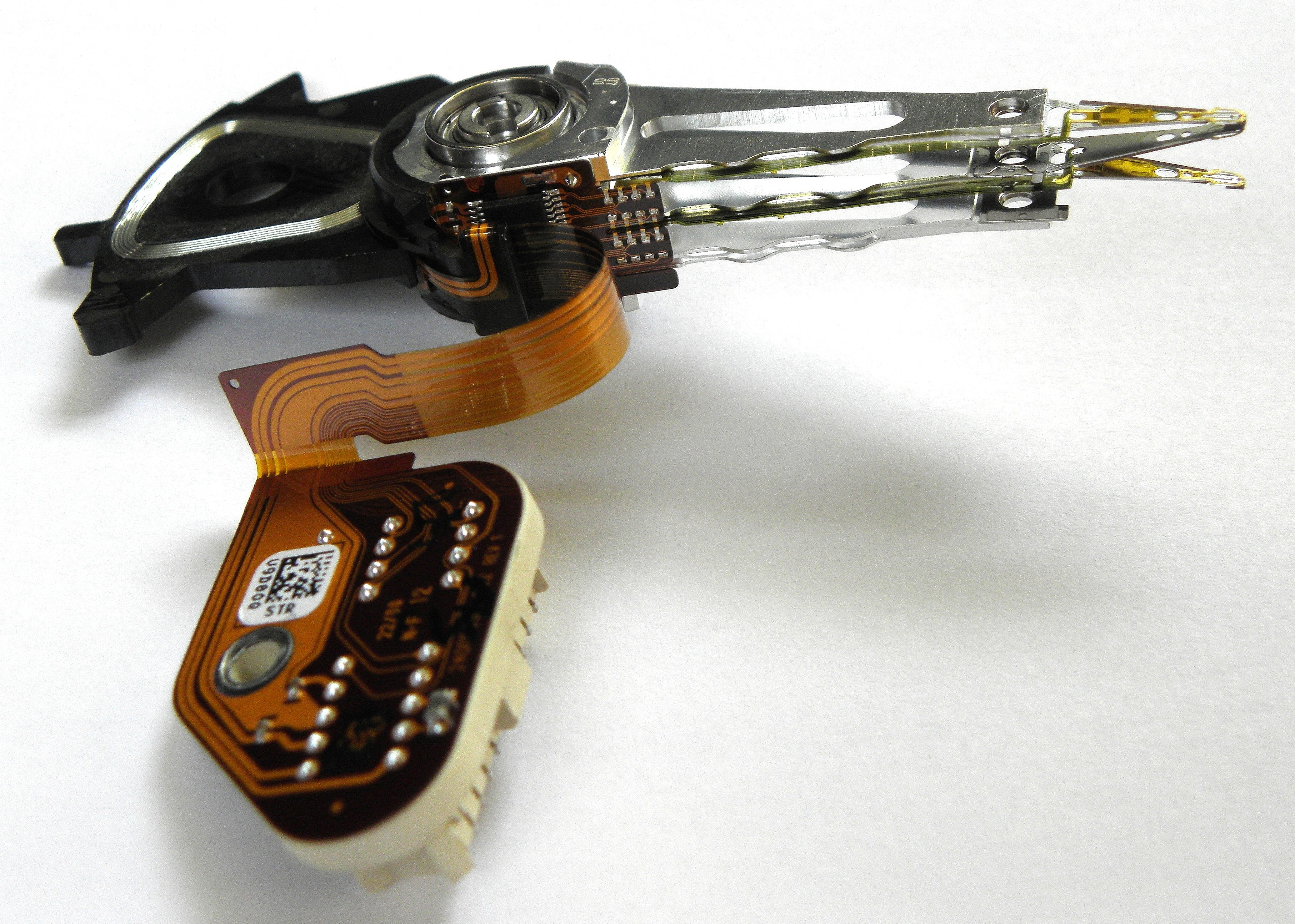 Vue globale des têtes de lecture écriture d'un disque dur et son câblage